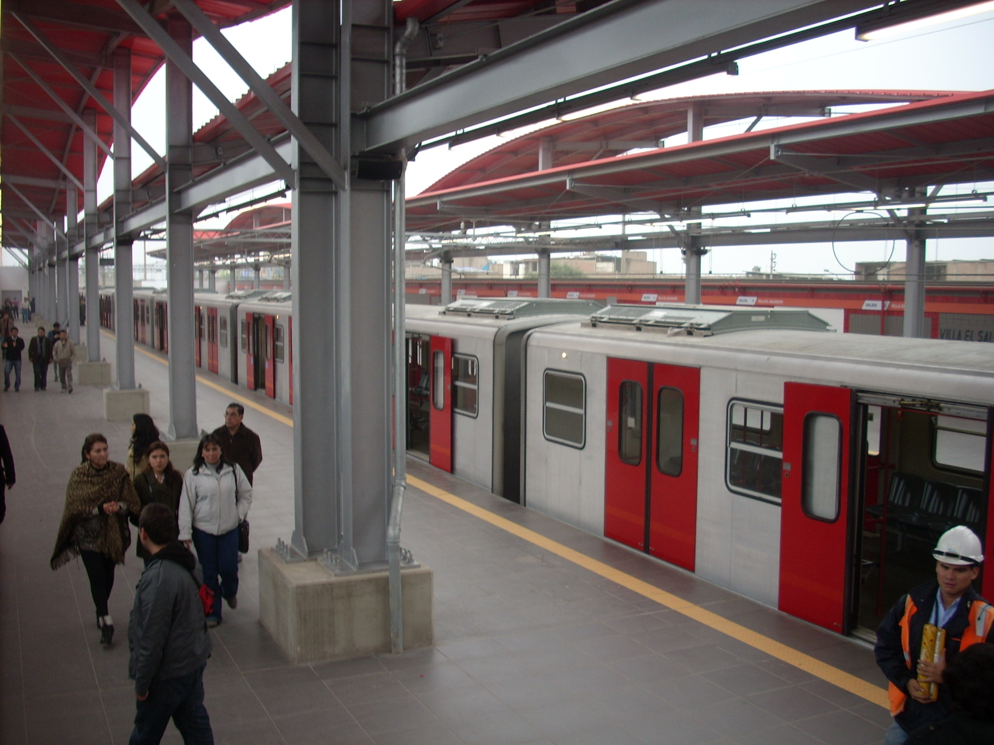 Tren en Estacion Villa el Salvador - Anden de llegada del Norte